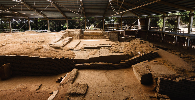 Túcume, Lambayeque, Perú